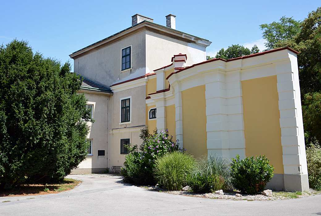 Reste des ehemaligen Schlosses Hirschstetten